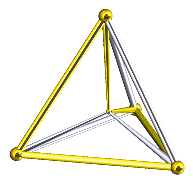 位於四維正五胞體中的扭歪五邊形 The copyright holder of this file, Robert Webb, allows anyone to use it for any purpose, provided that the copyright holder is properly attributed. Redistribution, derivative work, commercial use, and all other use is permitted. Attribution: Attribution must be given to Robert Webb's Stella software as the creator of this image along with a link to the website: A complimentary copy of any book or poster using images from the Software would also be appreciated where feasible. This work is free and may be used by anyone for any purpose. If you wish to use this content, you do not need to request permission as long as you follow any licensing requirements mentioned on this page.